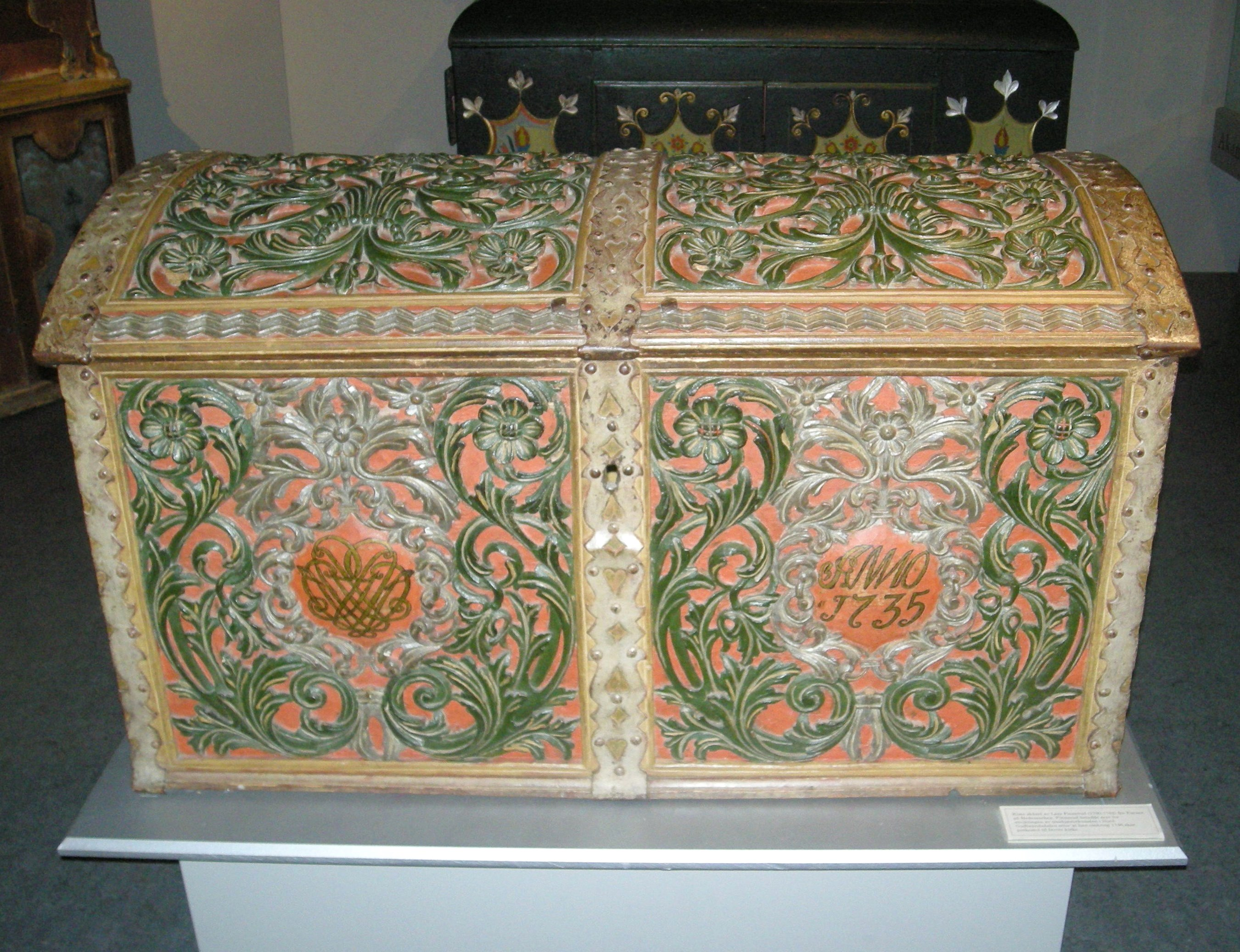 Kiste fra Storlien (1735) skåret av Lars Pinnerud, nå på Maihaugen.